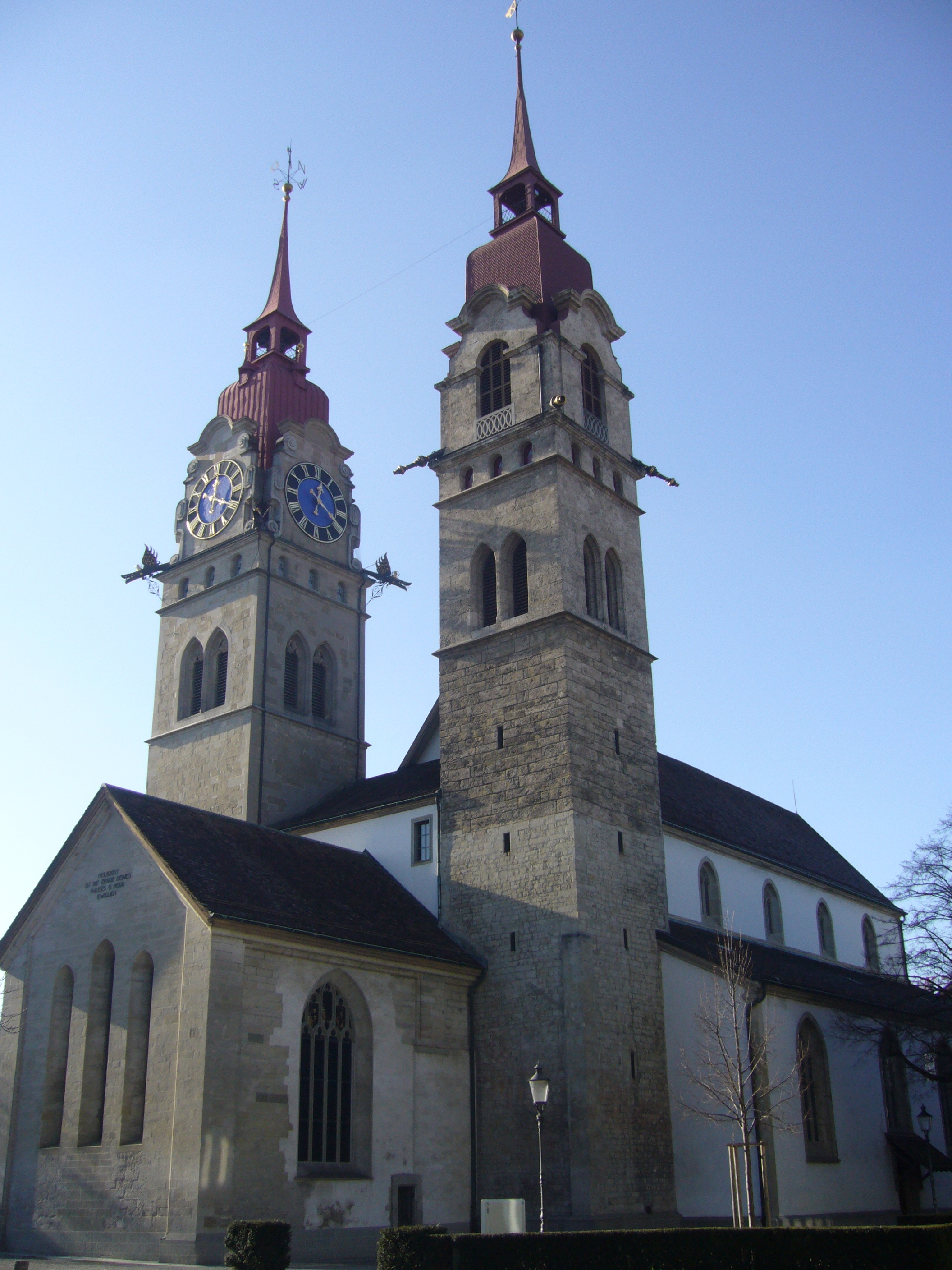 Stadtkirche Winterthur, von Oſtnordoſten geſehn.